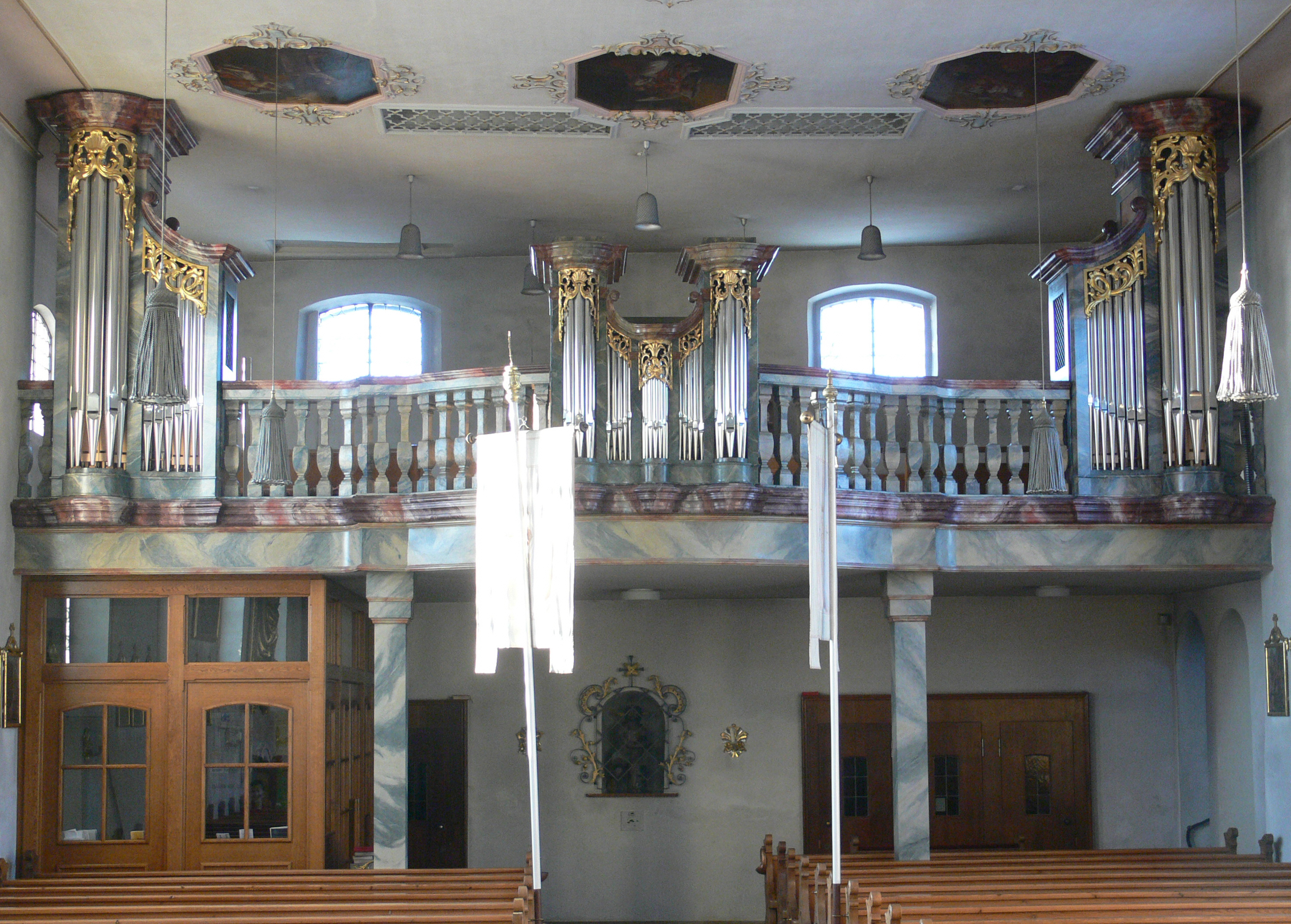 Pfarrkirche Mariä Geburt, (Horgenzell-)Hasenweiler Orgel (Mittelteil: Gehäuse der ehemaligen Orgel des Klosters St. Michael, Ravensburg, von Joseph Gabler)